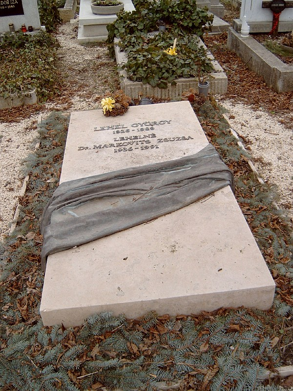 Lehel György (Bp., 1926. febr. 10. – Bp., 1989. szept. 25.) karmester sírja Budapesten. Farkasréti temető: 31-1-106.